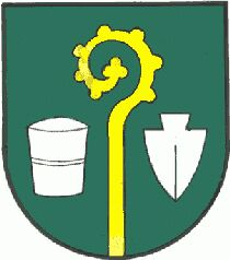 Gemeindewappen von Kobenz